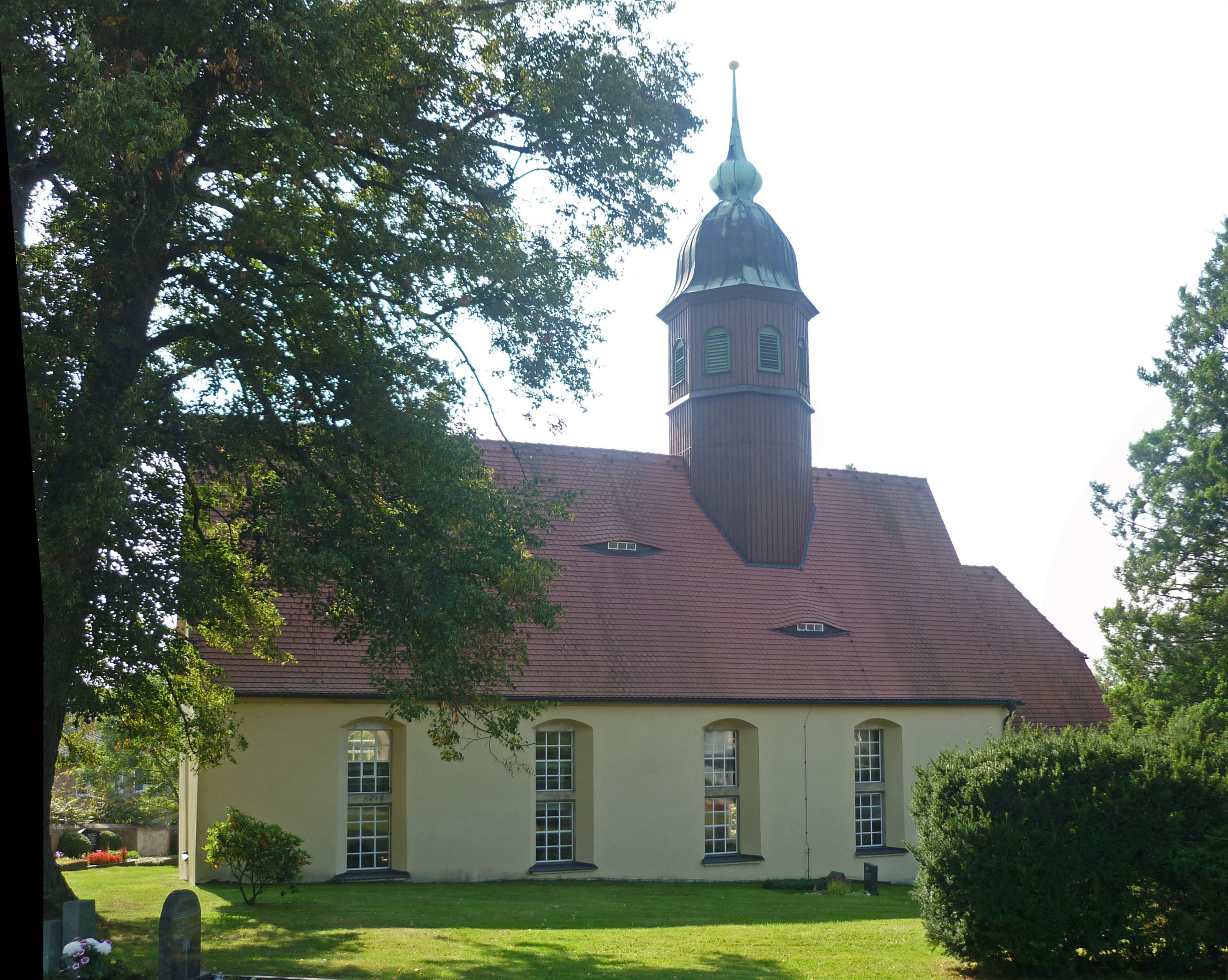 Dorfkirche in Bühlau bei Großharthau